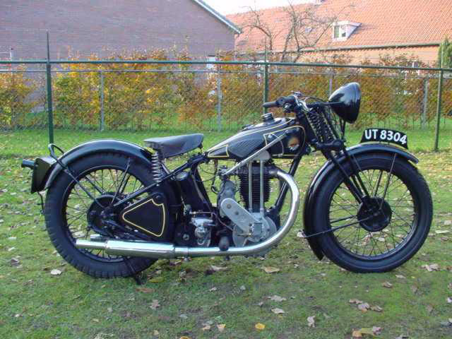 Ok Supreme 500cc motorcycle 1930